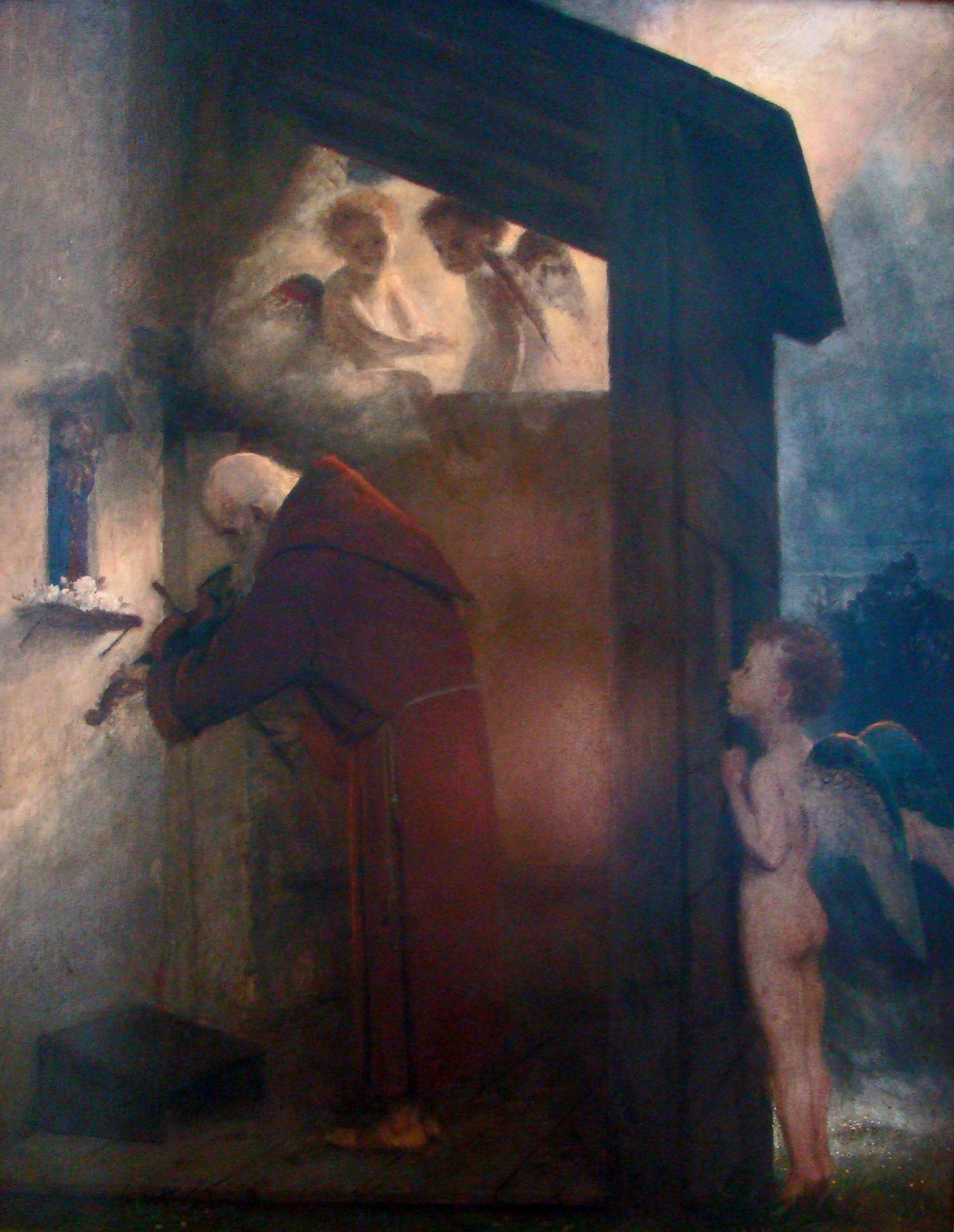 label QS:Lde,"Der Einsiedler"label QS:Lru,"Отшельник"